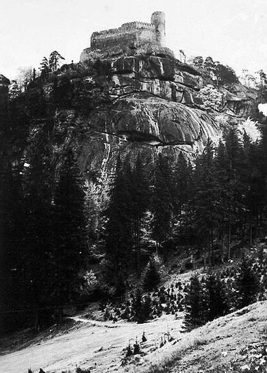 Zamek Chojnik z 1841 roku